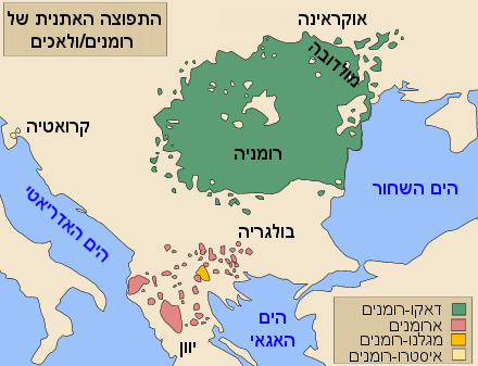 תפוצה אתנית של רומנים